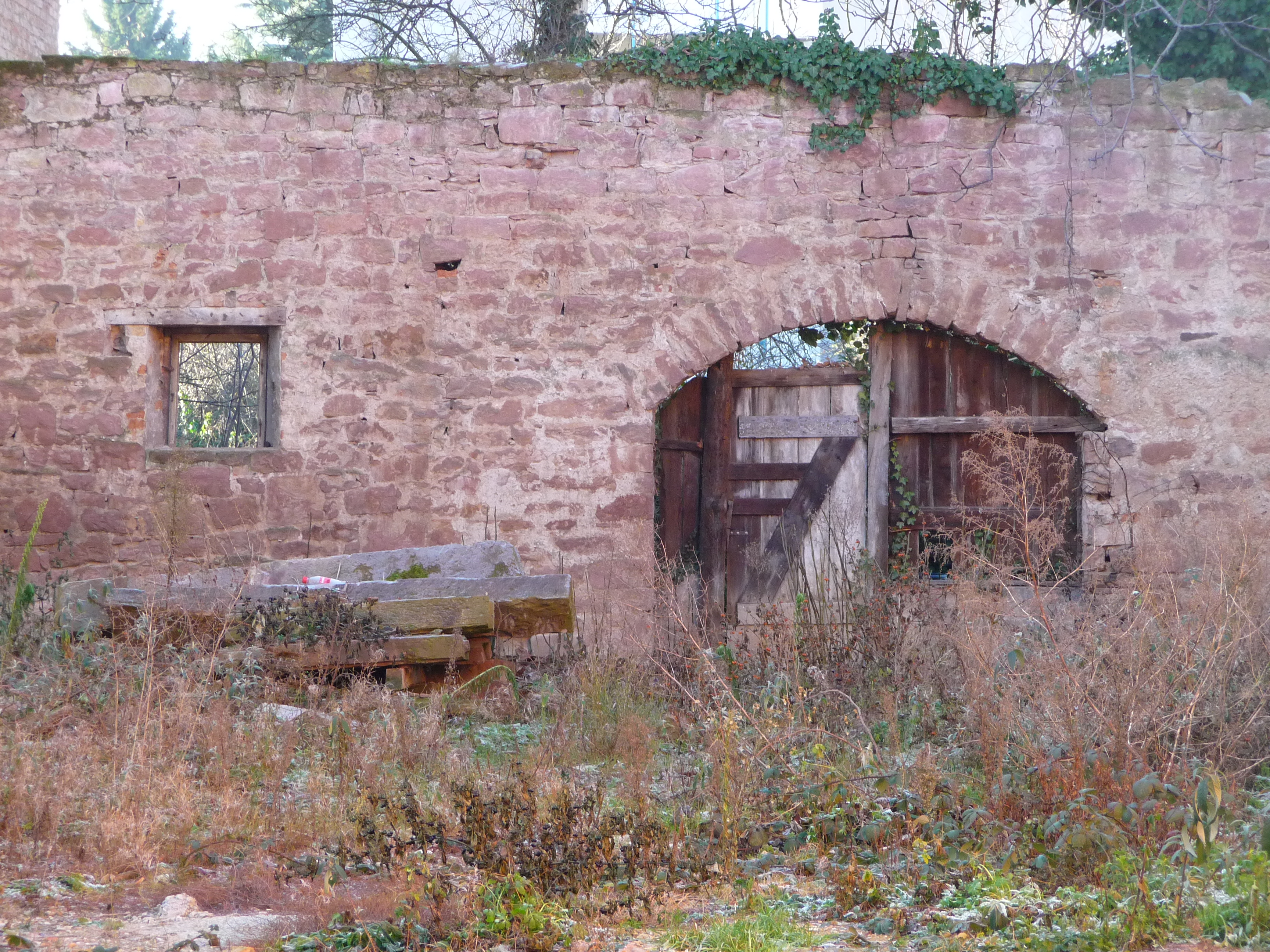 Eppelheim - Mauerreste mit Torbogen auf Abbruchgrundstück